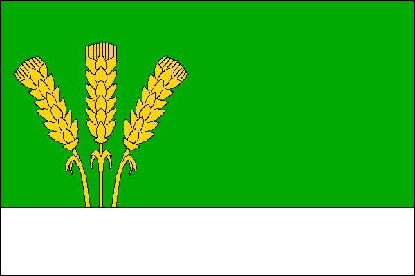 Vlajka obce Velká Štáhle